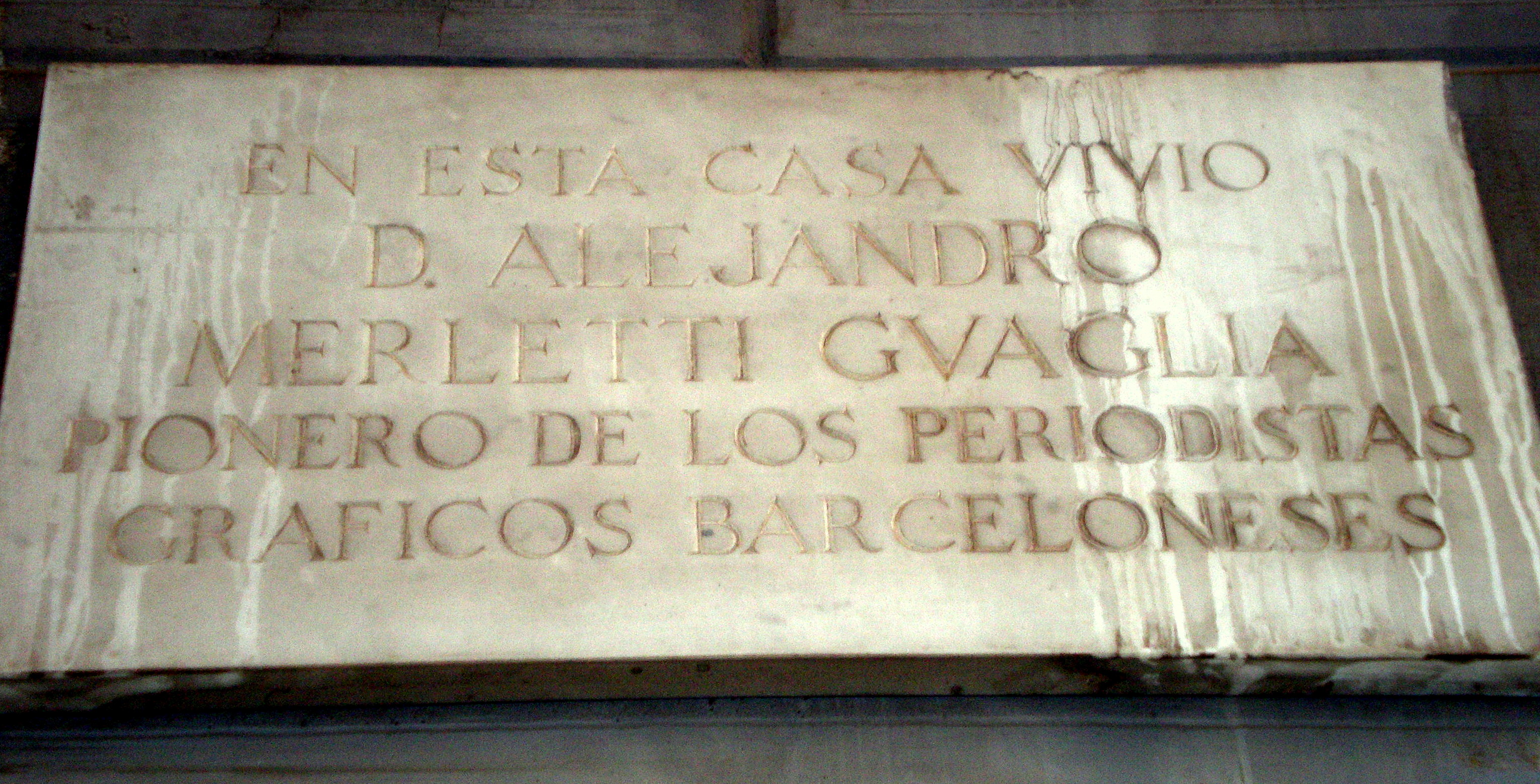 Placa a la paret de la casa del carrer Tapioles on va viure El Sr. Alexandre Merletti Guaglia, pioner dels periodistes gràfics de Barcelona Alessandro Merletti i Quaglia Torí, 1860 - Barcelona, 1943 Fotògraf d'origen italià. De jove emigrà a l'Argentina per exercir la seva professió, però aviat decidí d'anar-se'n. De retorn s'establí a Barcelona (1889), on restaria per sempre. Exercí de fotògraf professional i s'especialitzà en reportatges gràfics, de manera que cal considerar-lo com un dels pioners del periodisme gràfic a Catalunya. Són molt conegudes, per exemple, les fotografies que obtingué en el judici de Ferrer i Guàrdia (1909) i que foren publicades en bona part de la premsa internacional. Treballs seus aparegueren a "Blanco y negro", "La Ilustración Artística", "Daily Mirror", etc. Personatge molt característic pel seu polifacetisme, es dedicà també a la invenció i a la tècnica aplicada.